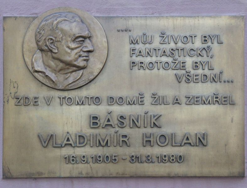 Praha, Malá Strana, U lužického semináře 97/18, pamětní deska na domě, ve kterém žil a zemřel Vladimír Holan - OpenStreetMap (Info)